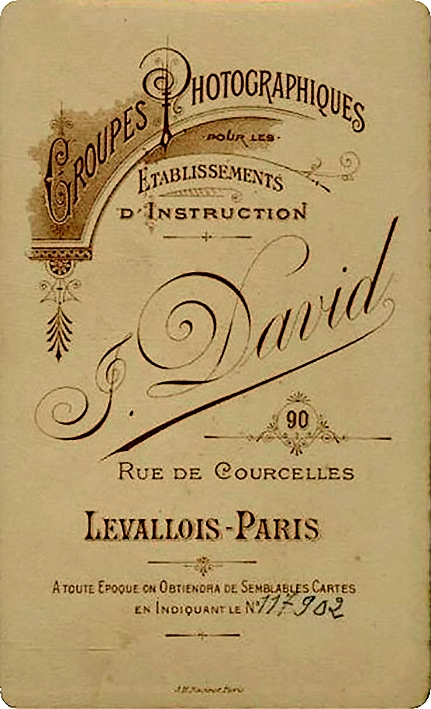 Dos d'une photo de Jules David, vers 1890. Groupes photographiques pour les établissements d'instruction